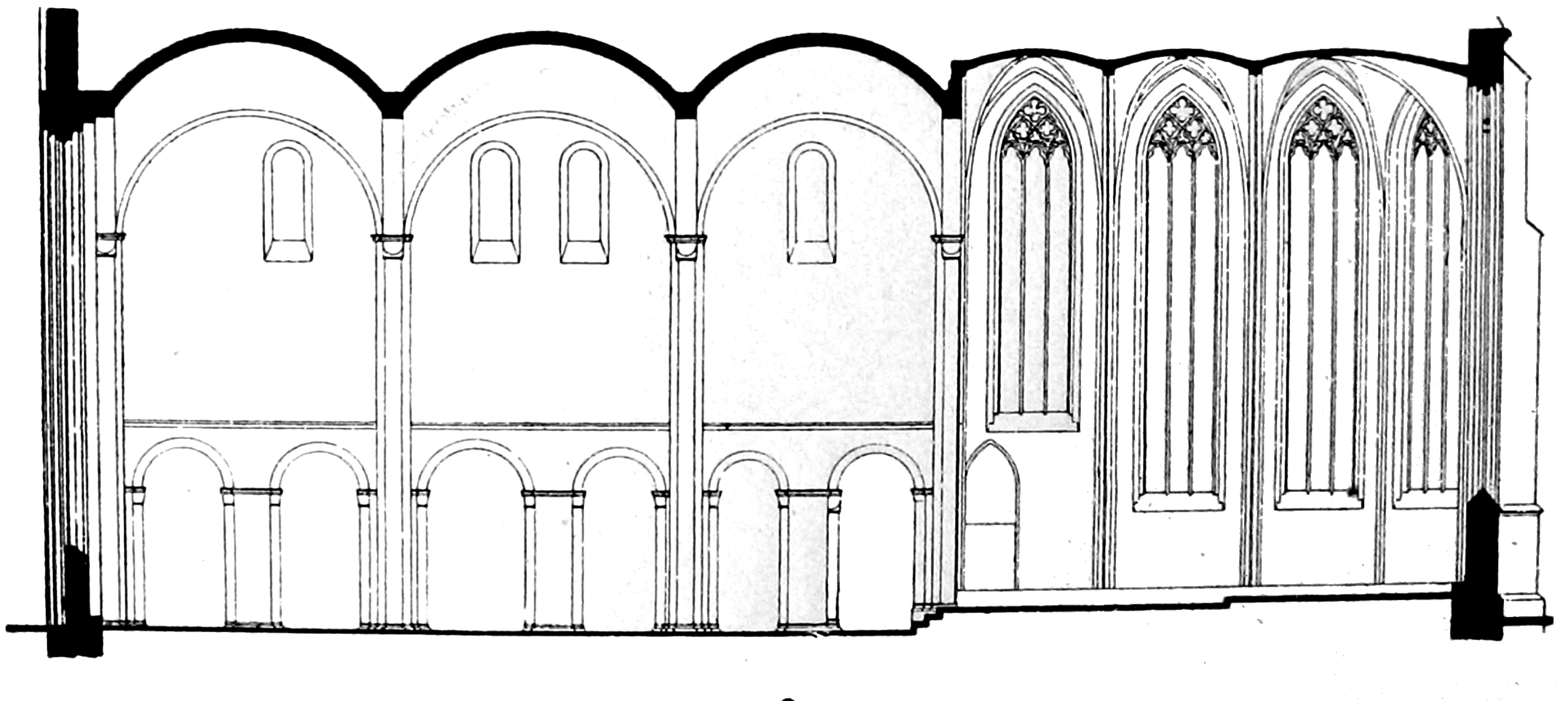 Dortmund, Marienkirche, Schiff und Chor, Zeichnung